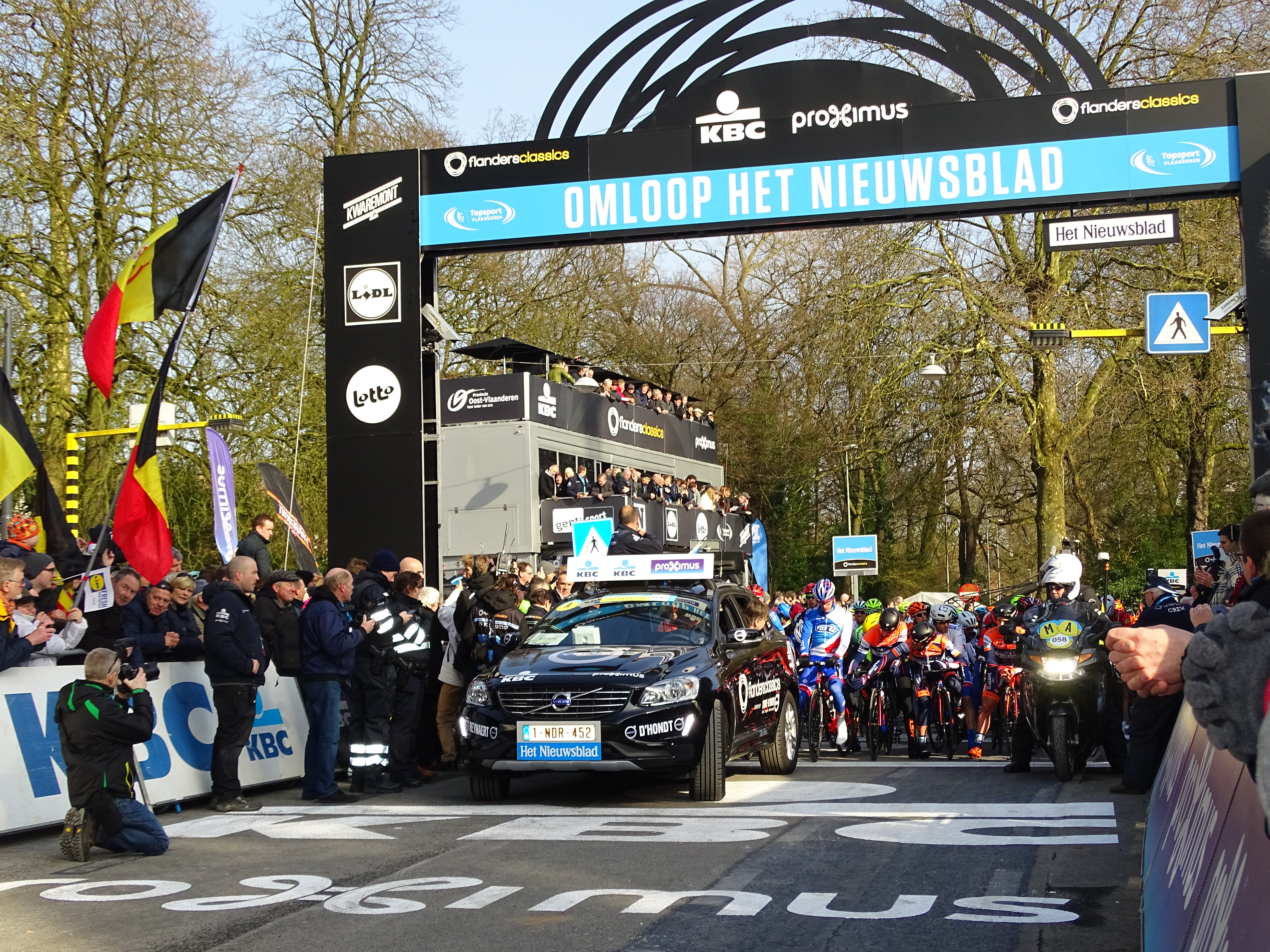 Reportage réalisé le samedi 27 février à l'occasion du départ et de l'arrivée du Circuit Het Nieuwsblad 2016 et de l'arrivée du Circuit Het Nieuwsblad féminin 2016 à Gand, Belgique.